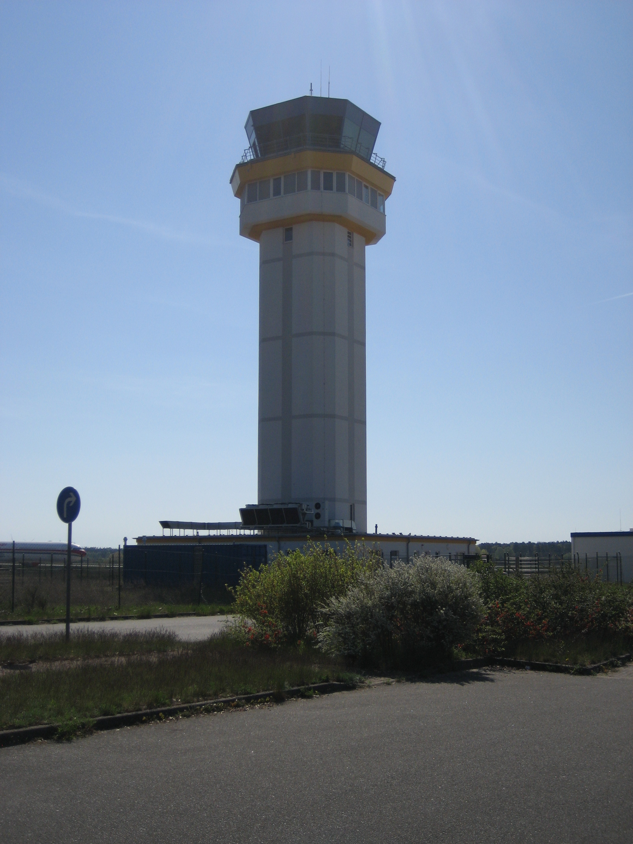 Flughafen Schwerin-Parchim: Flughafentower.